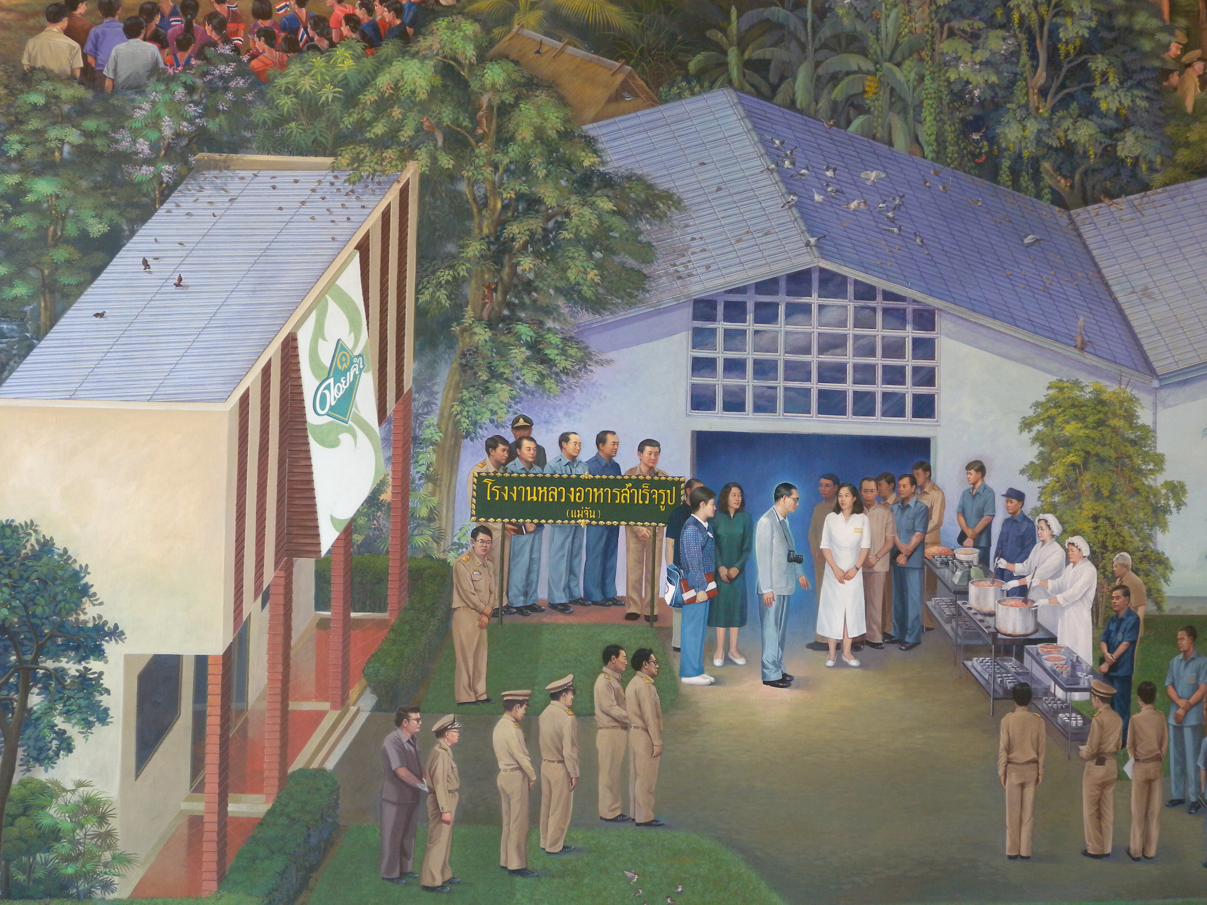 จิตรกรรมฝาผนังเล่าเรื่องโครงการในพระราชดำริ โครงการอันเนื่องมาจากพระราชดำริ และโครงการส่วนพระองค์ในพระบาทสมเด็จพระปรมินทรมหาภูมิพลอดุลยเดช ภายในพระที่นั่งทรงธรรม มณฑลพระราชพิธีถวายพระเพลิงพระบรมศพพระบาทสมเด็จพระปรมินทรมหาภูมิพลอดุลยเดช ในภาพนี้ แสดงภาพพระบาทสมเด็จพระปรมินทรมหาภูมิพลอดุลยเดชเสด็จพระราชดำเนินไปยังโรงงานดอยคำ อำเภอแม่จัน จังหวัดเชียงราย ซึ่งเป็นโรงงานแปรรูปผลิตภัณฑ์ทางการเกษตรของโครงการหลวง